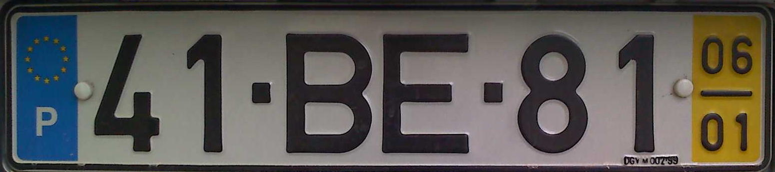 Portuguese 2002 type license plate